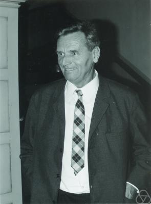 Gerrit Bol